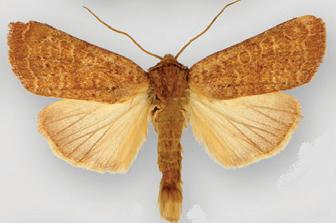 Hypotrix alamosa female